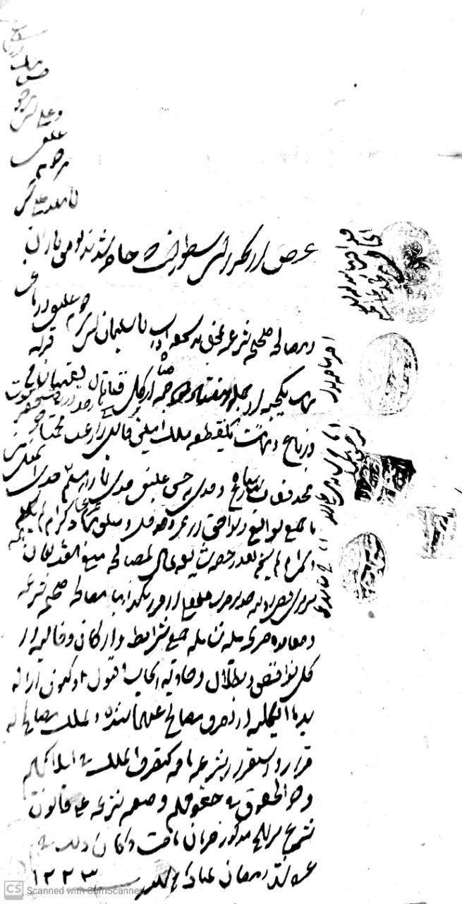 صلح نامچه